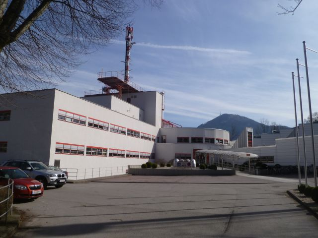 ORF-Landesstudio